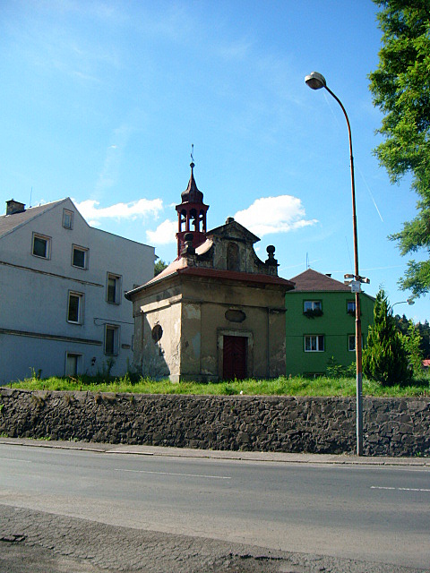 Kaple Nejsvětější Trojice (Benešov nad Ploučnicí), Benešov nad Ploučnicí